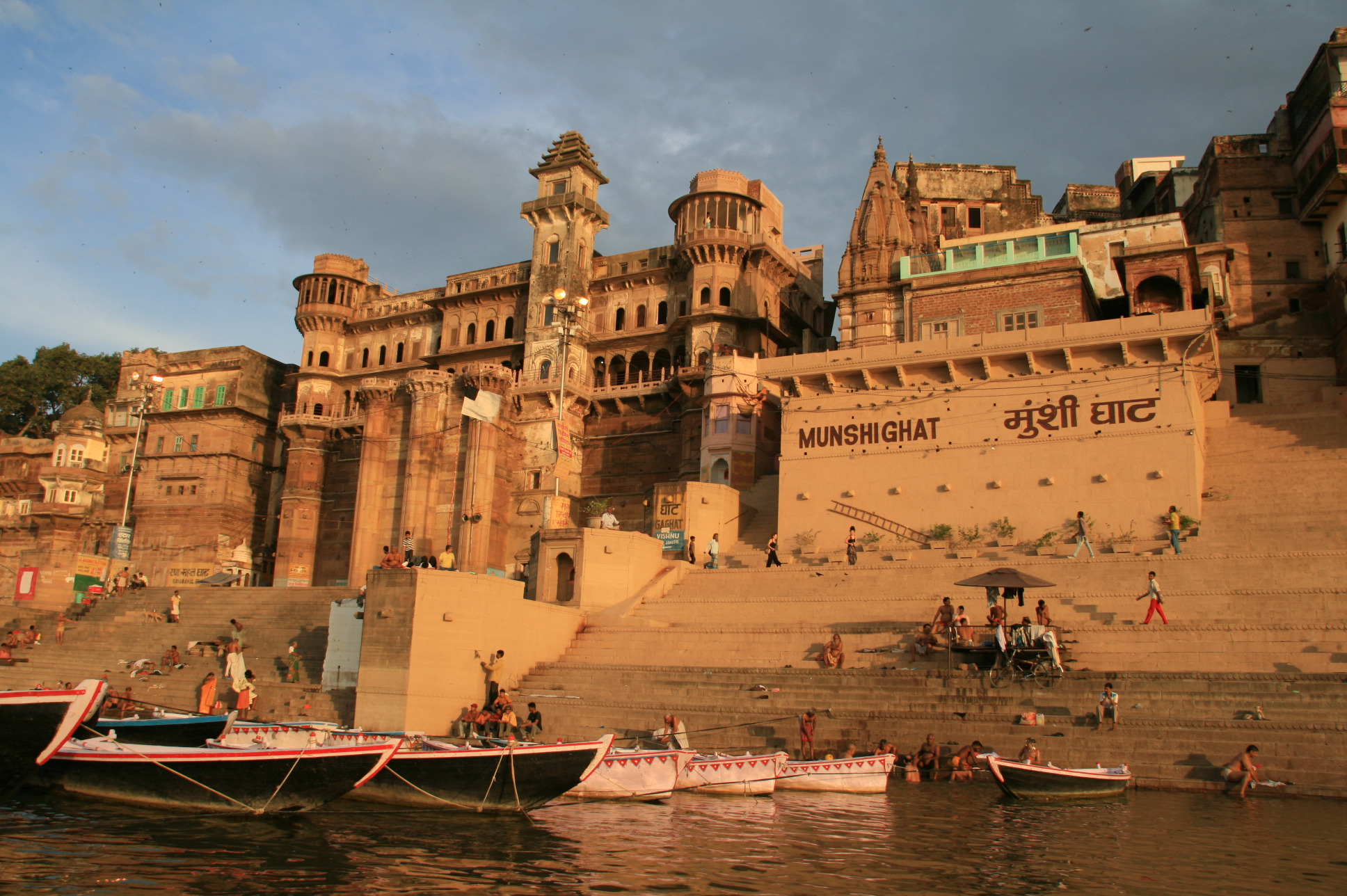 Agra & Varanasi 426